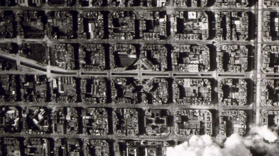 Fotografia aèria de la part central de l'Antiga Esquerra de l'Eixample l'any 1938, retallada a partir de la imatge File:Barcelona bombing (1938).jpg